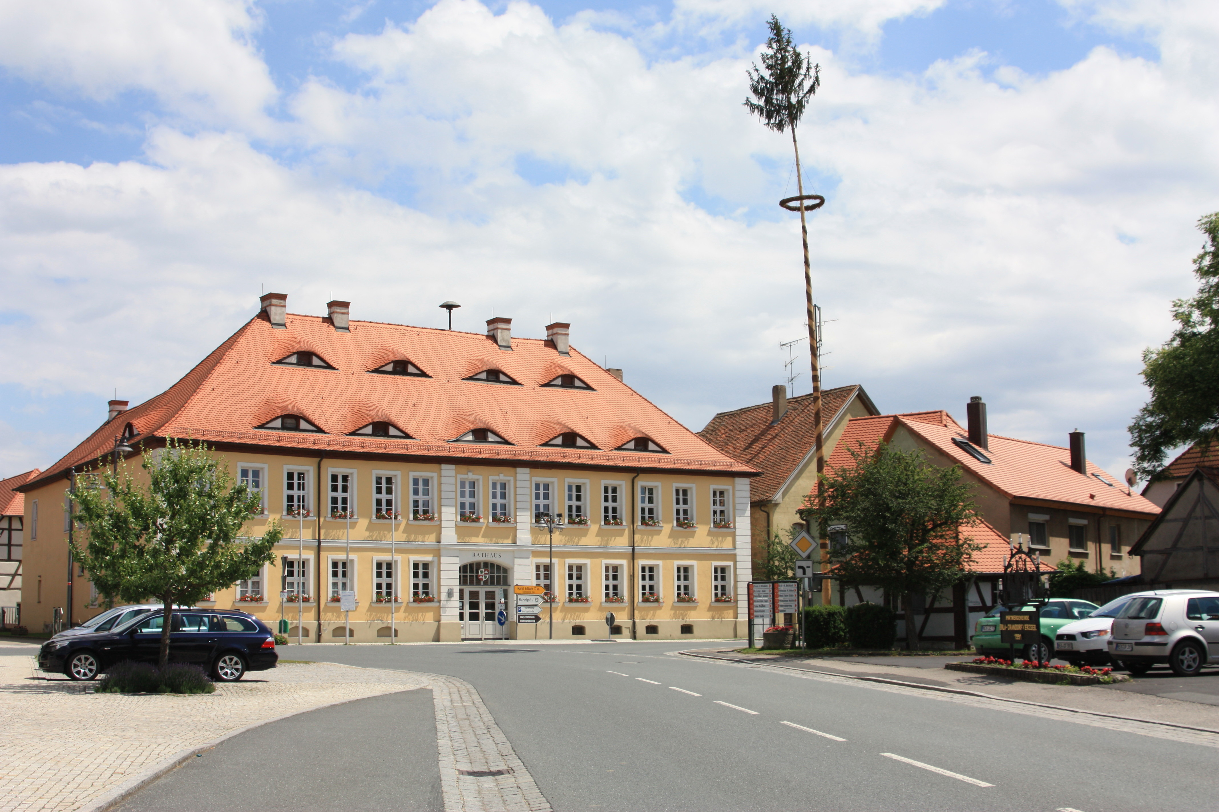 Ortsmitte